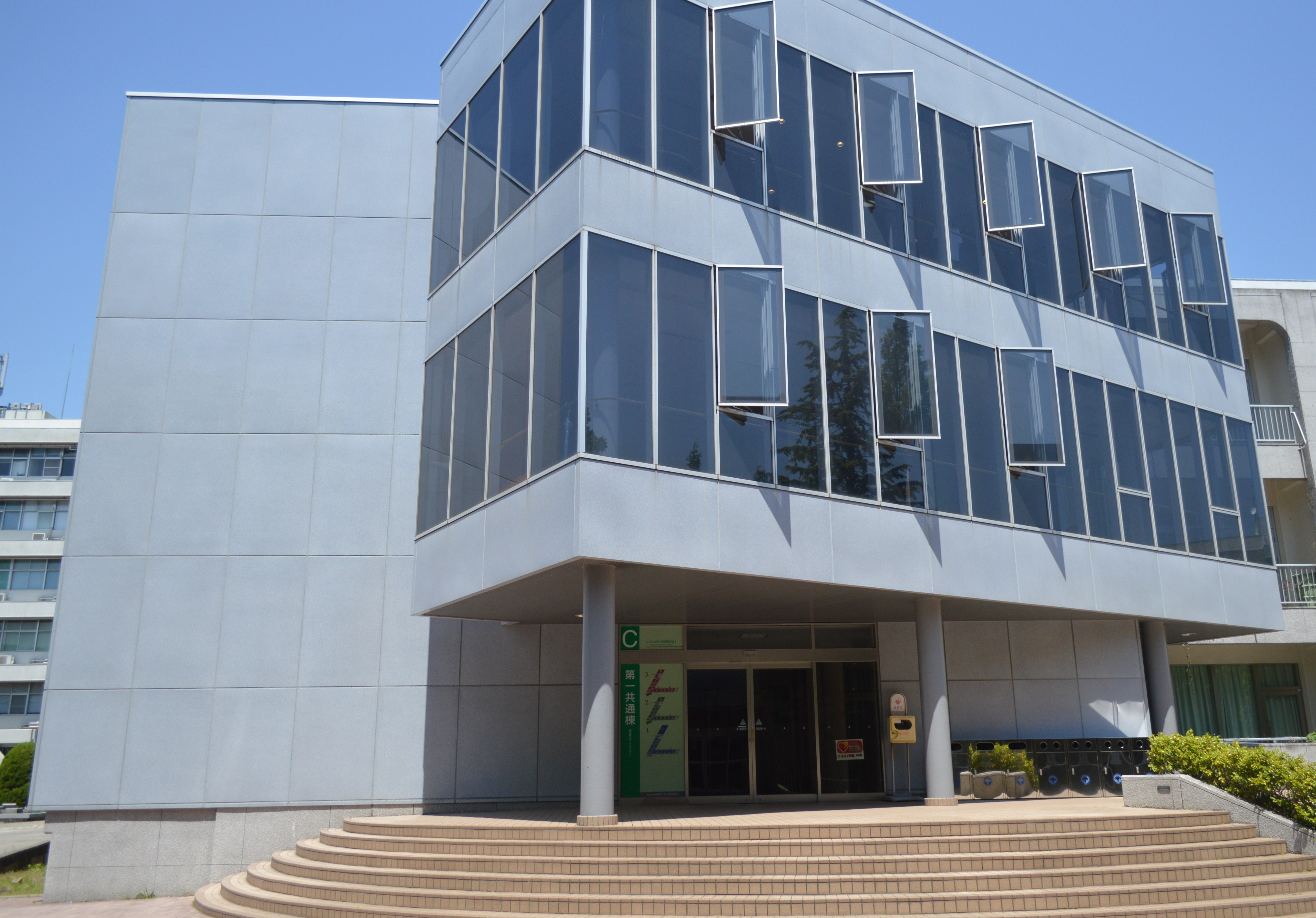 愛知教育大学の第一共通棟